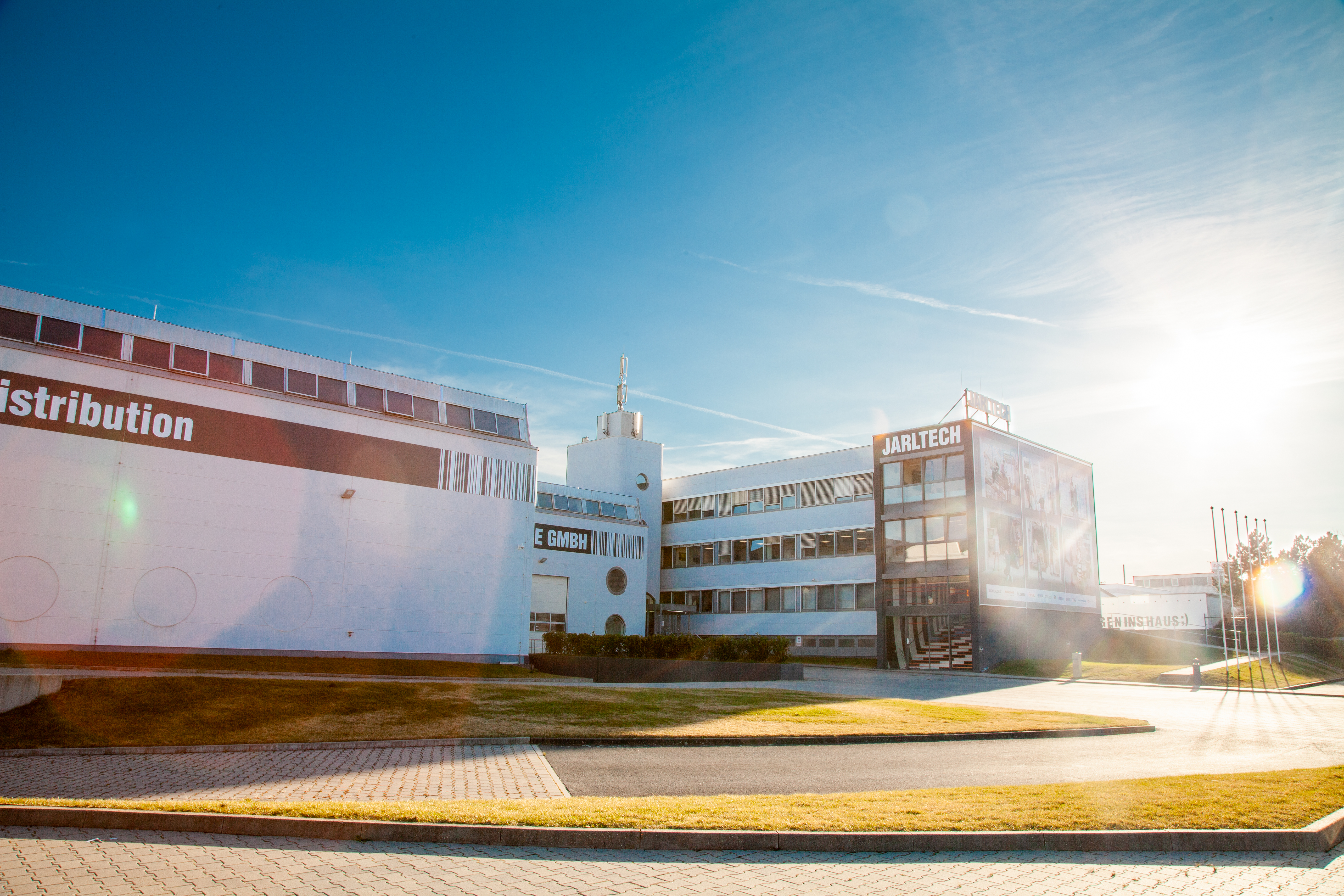 Jarltech Europe GmbH, Usingen 2017, ehemaliges Zumtobel-Gebäude